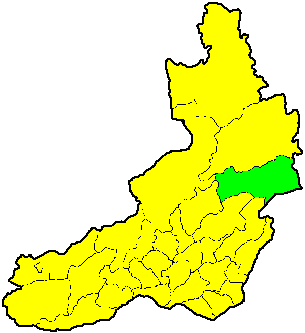 Могочинский район на карте Забайкальского края